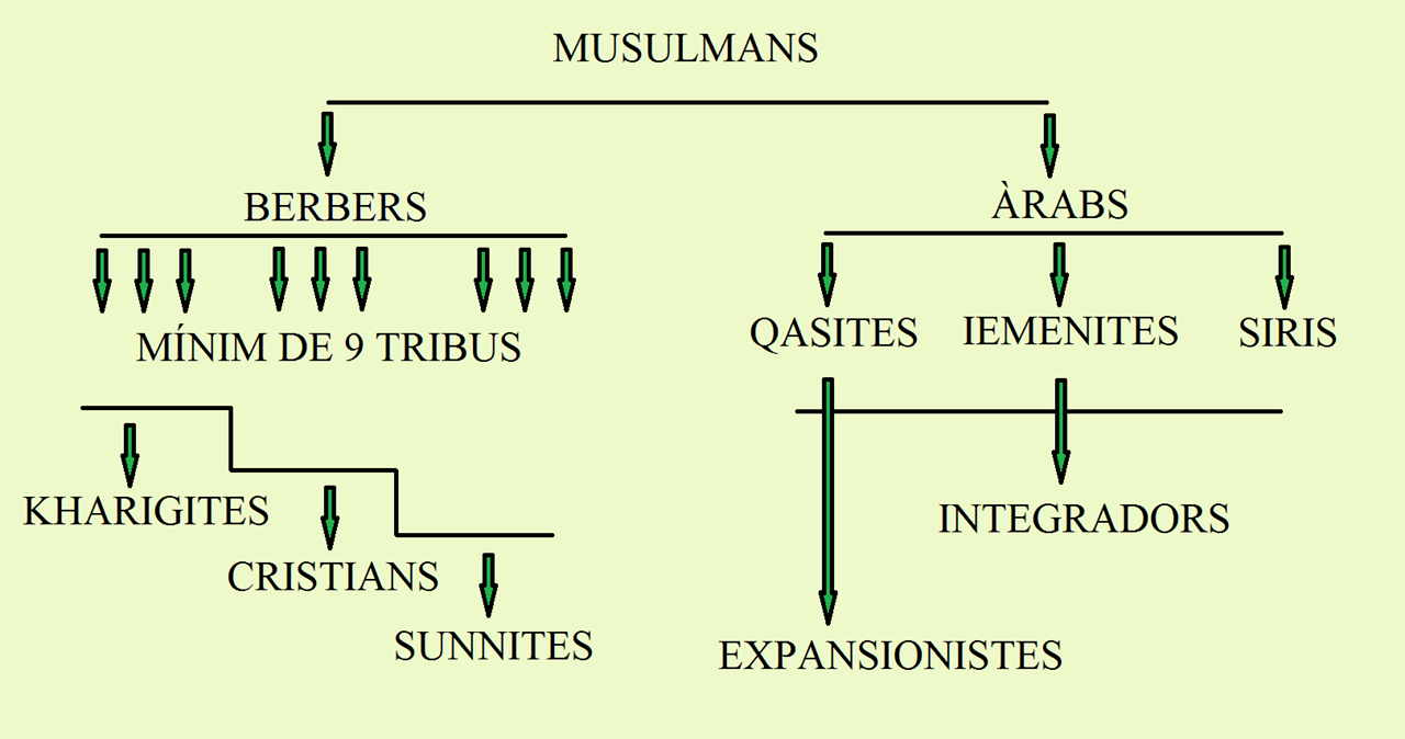 Revolta Berber a Hispània (742)